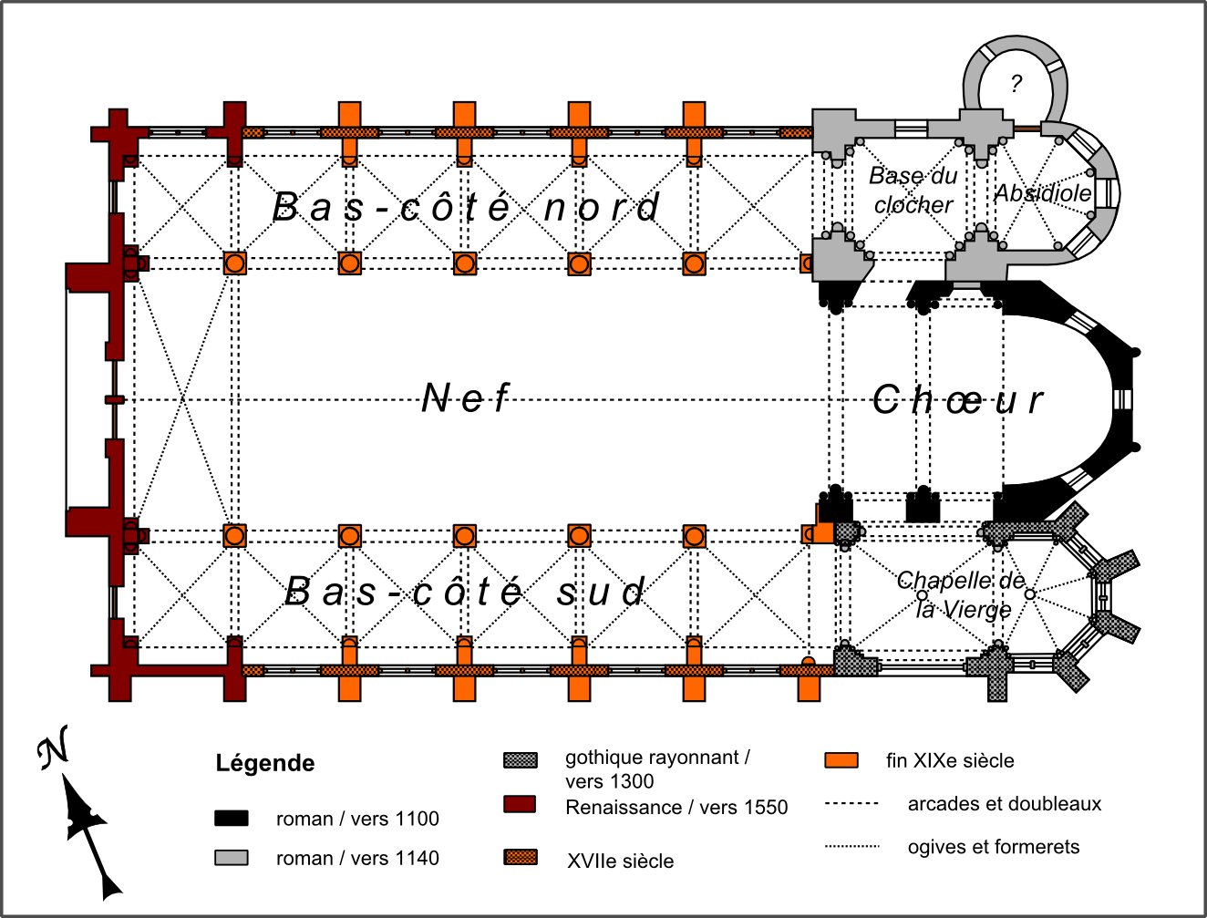 Plan schématique et approximatif.